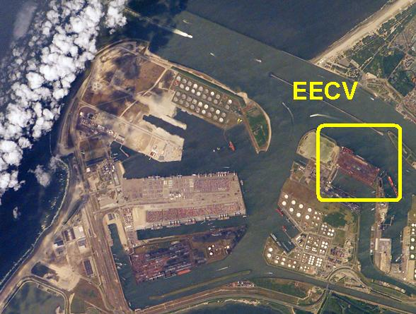 Ertsoverslagbedrijf Europoort C.V. in Rotterdam-Europoort 28 mei 2005.